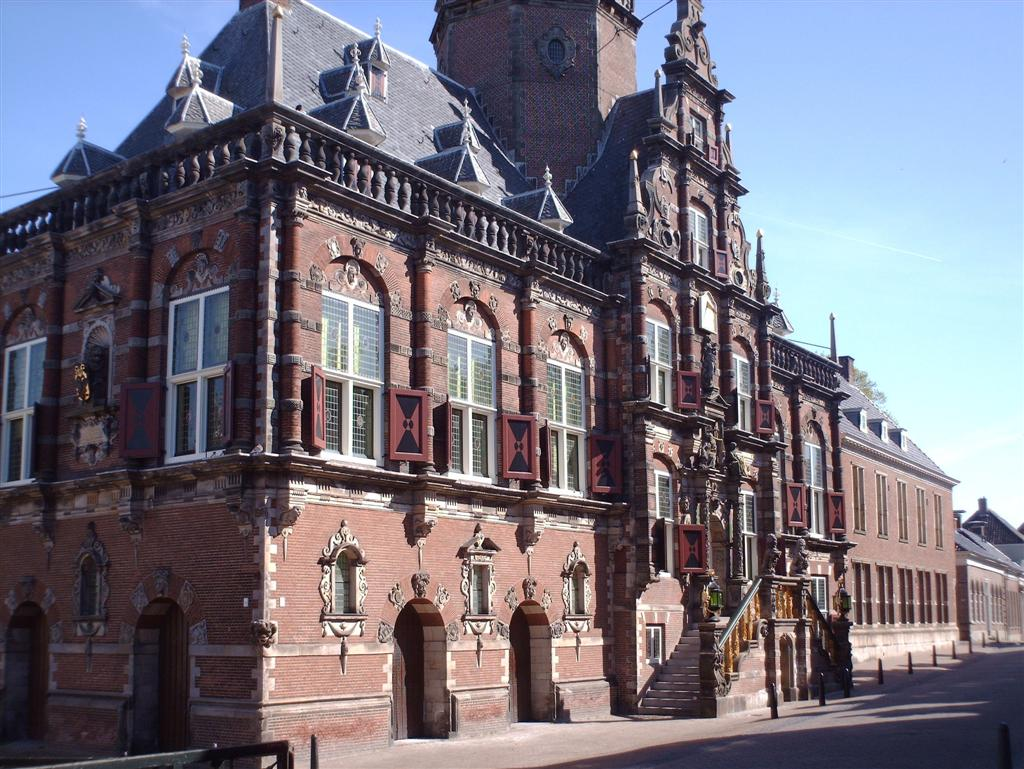 Stadhuis van Bolsward (ook waag)